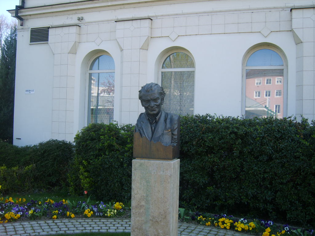 Keresztúry Dezső szobra Zalaegerszegen, a Keresztúry téren. Szórádi Zsigmond (*1962) alkotása (2004)